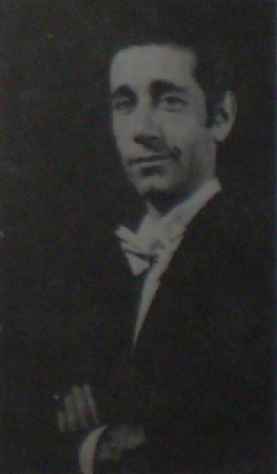 Victor Hugo Vieyra